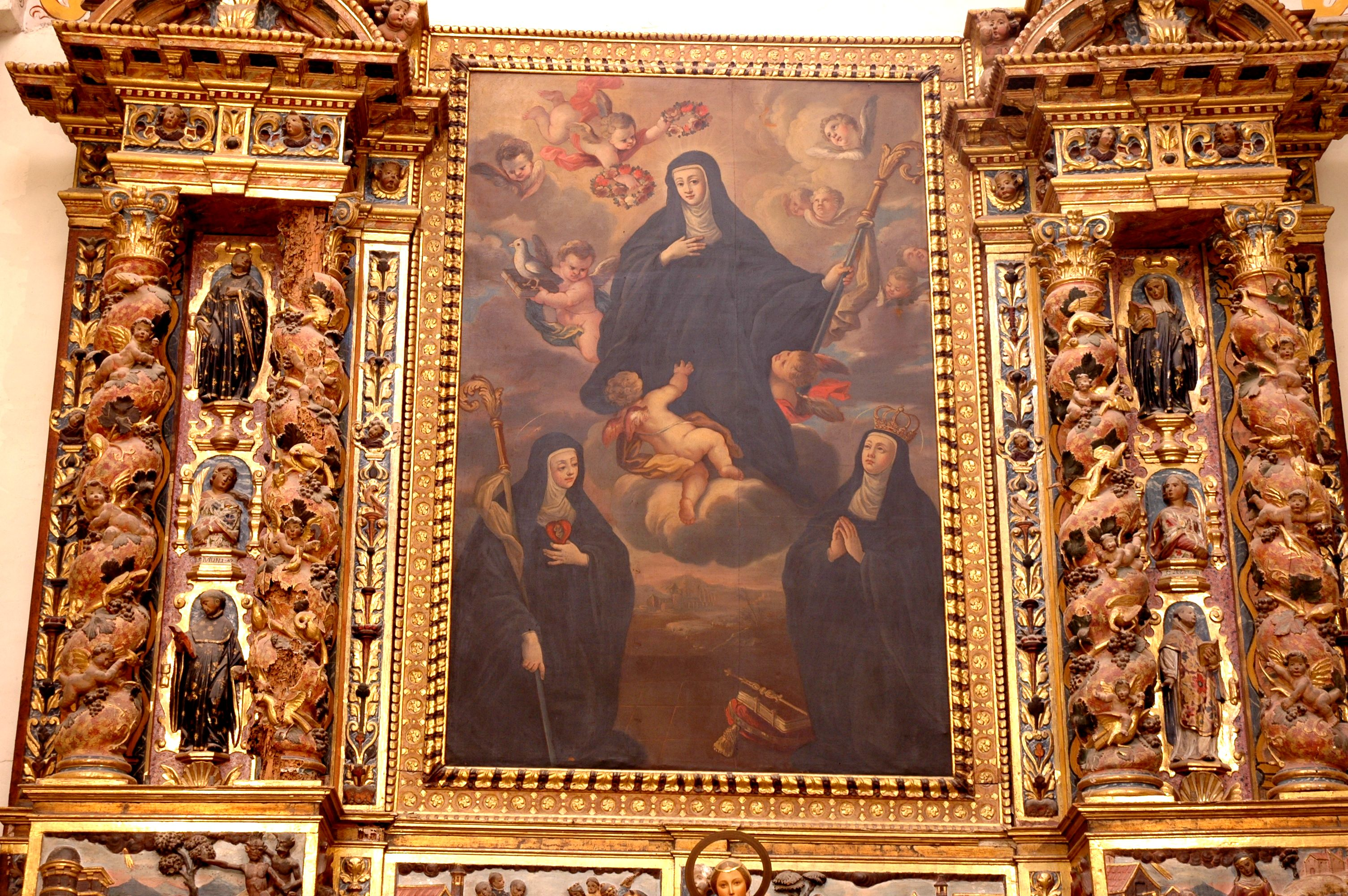 Monestir de Sant Cugat - Retaule de santa Escolàstica